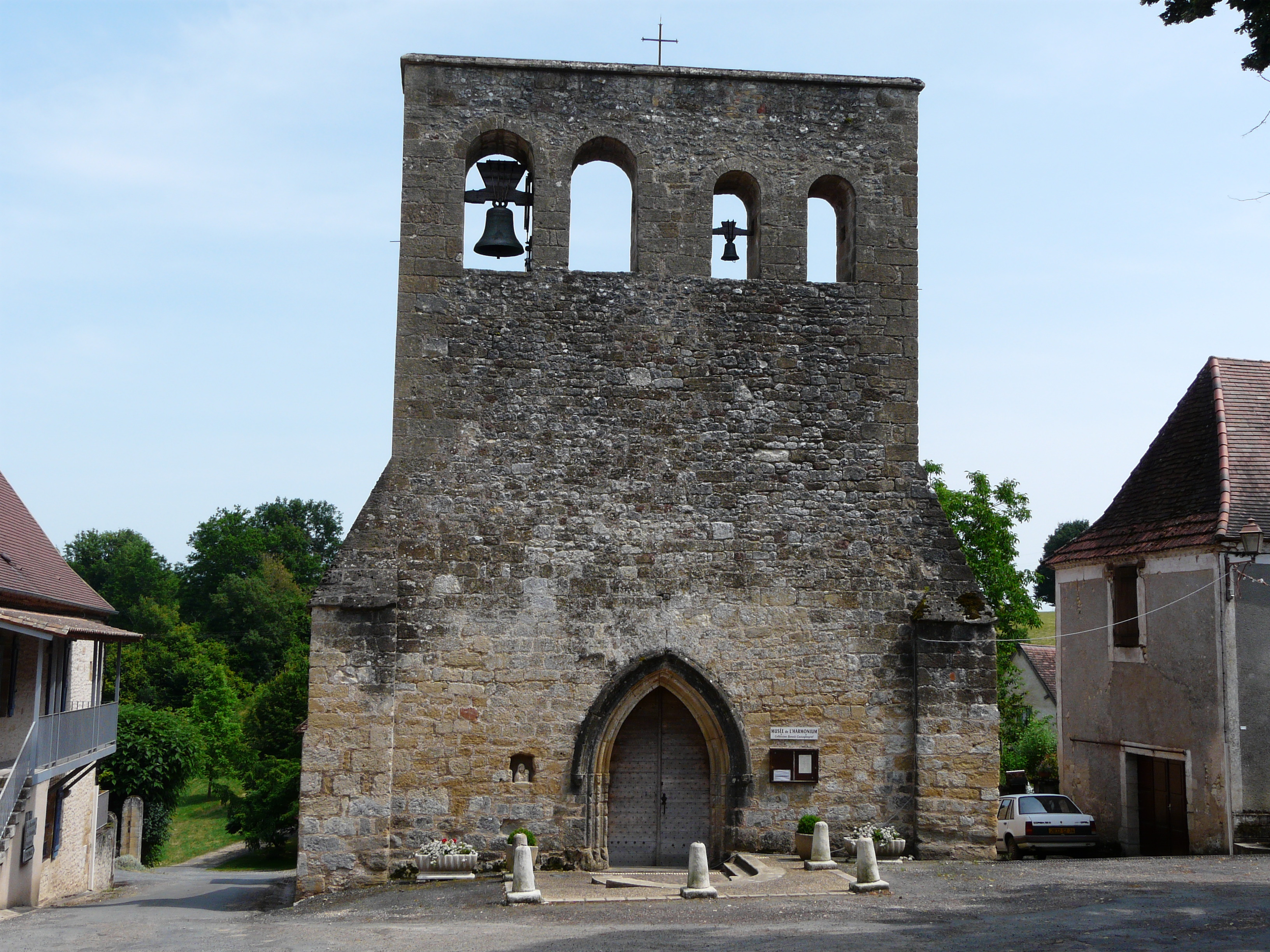 L'église Saint-Pierre-ès-Liens de Bars, Dordogne, France.